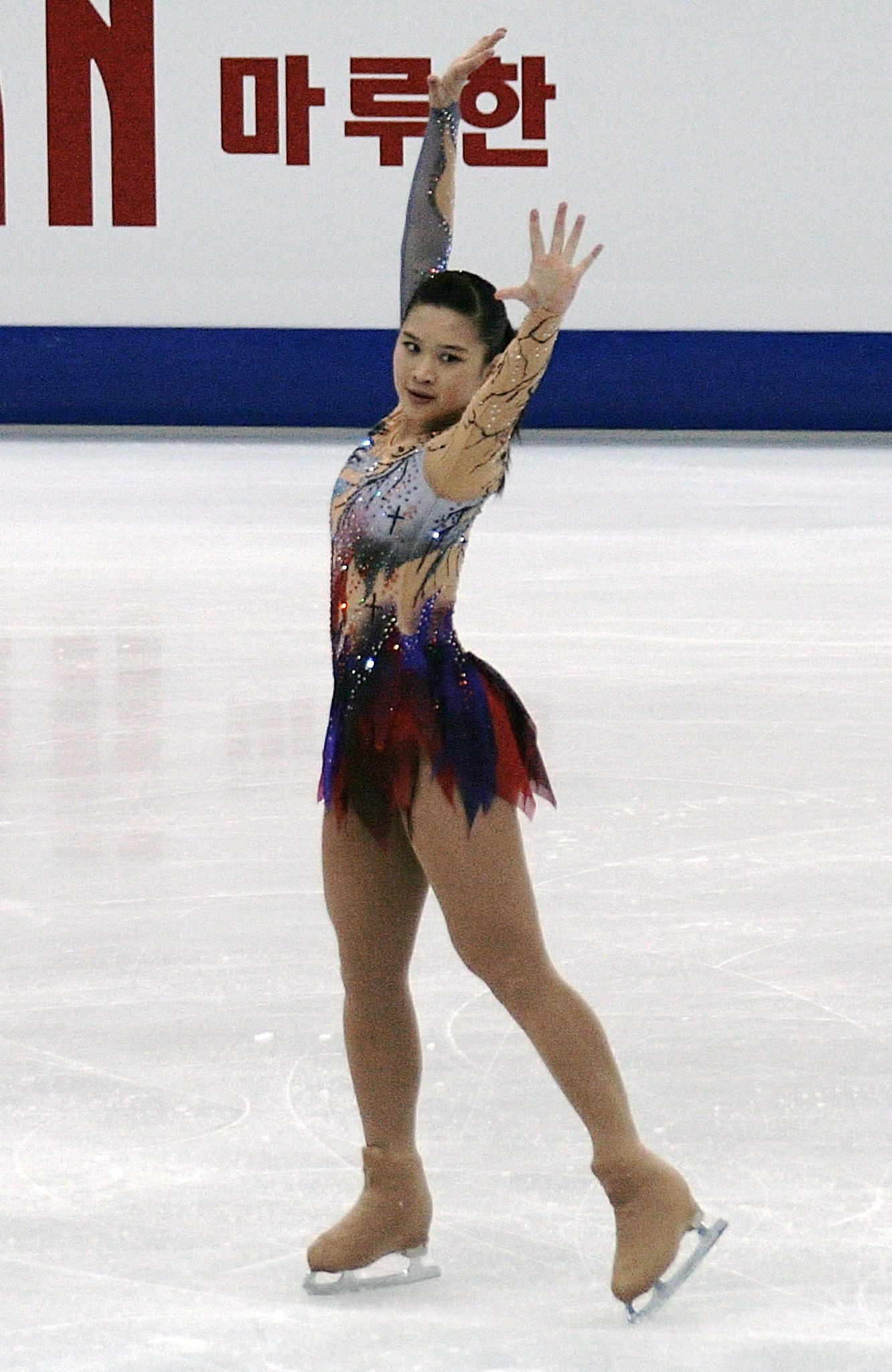 Жаира Костиниано (Филиппины) на чемпионате мира по фигурному катанию 2012.